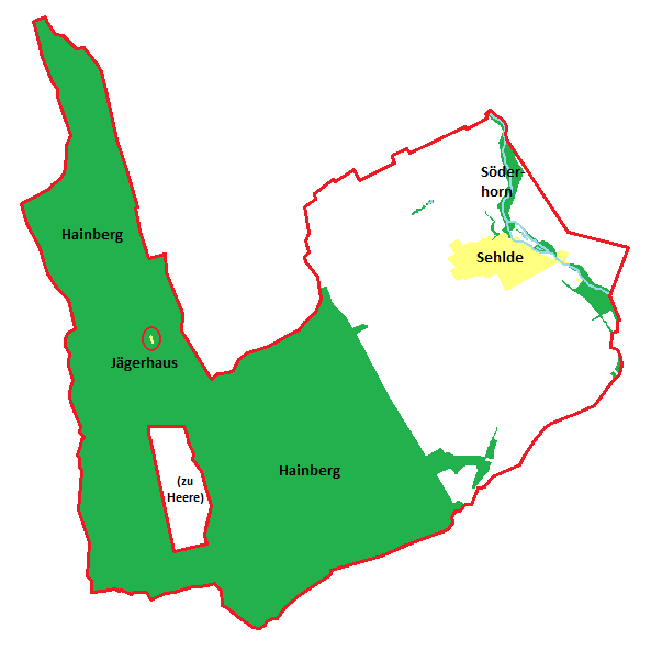 Lage des Dorfes Sehlde und des Jägerhauses in der Gemeinde Sehlde